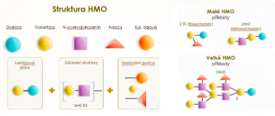 Vytvorené a upravené podľa: Bode L, Jantscher-Krenn E. Structure-Function Relationships of Human Milk Oligosaccharides. Adv. Nutr. 2012; 3: 383S–391S.